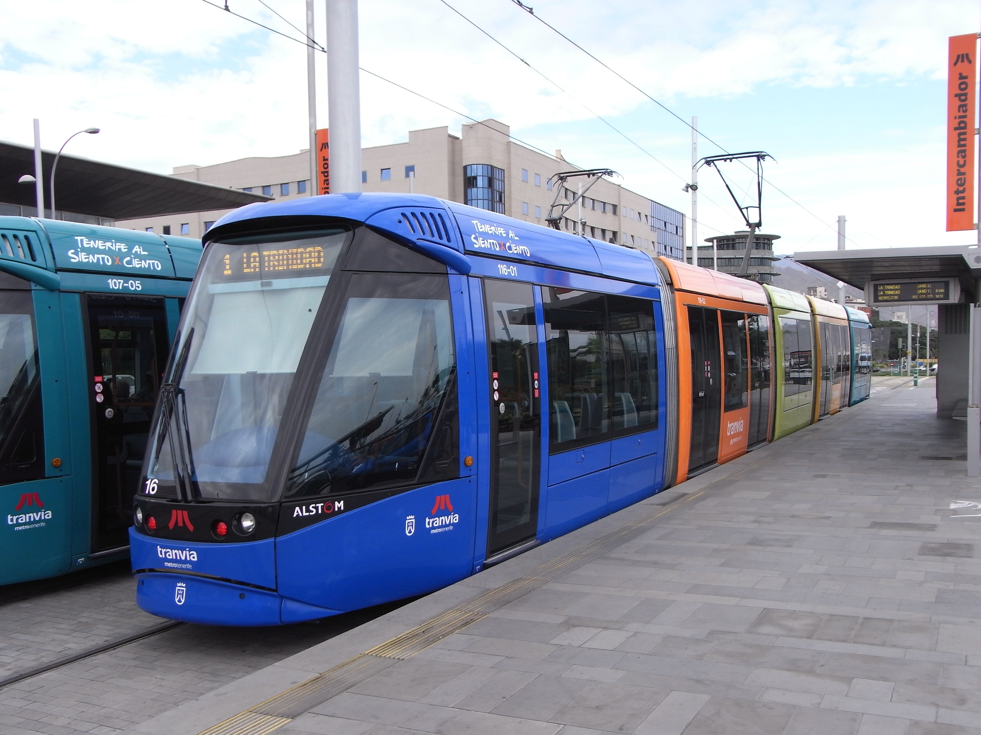 Santa Cruz de Tenerife, tramoj ĉe finstacio "Intercambiador".